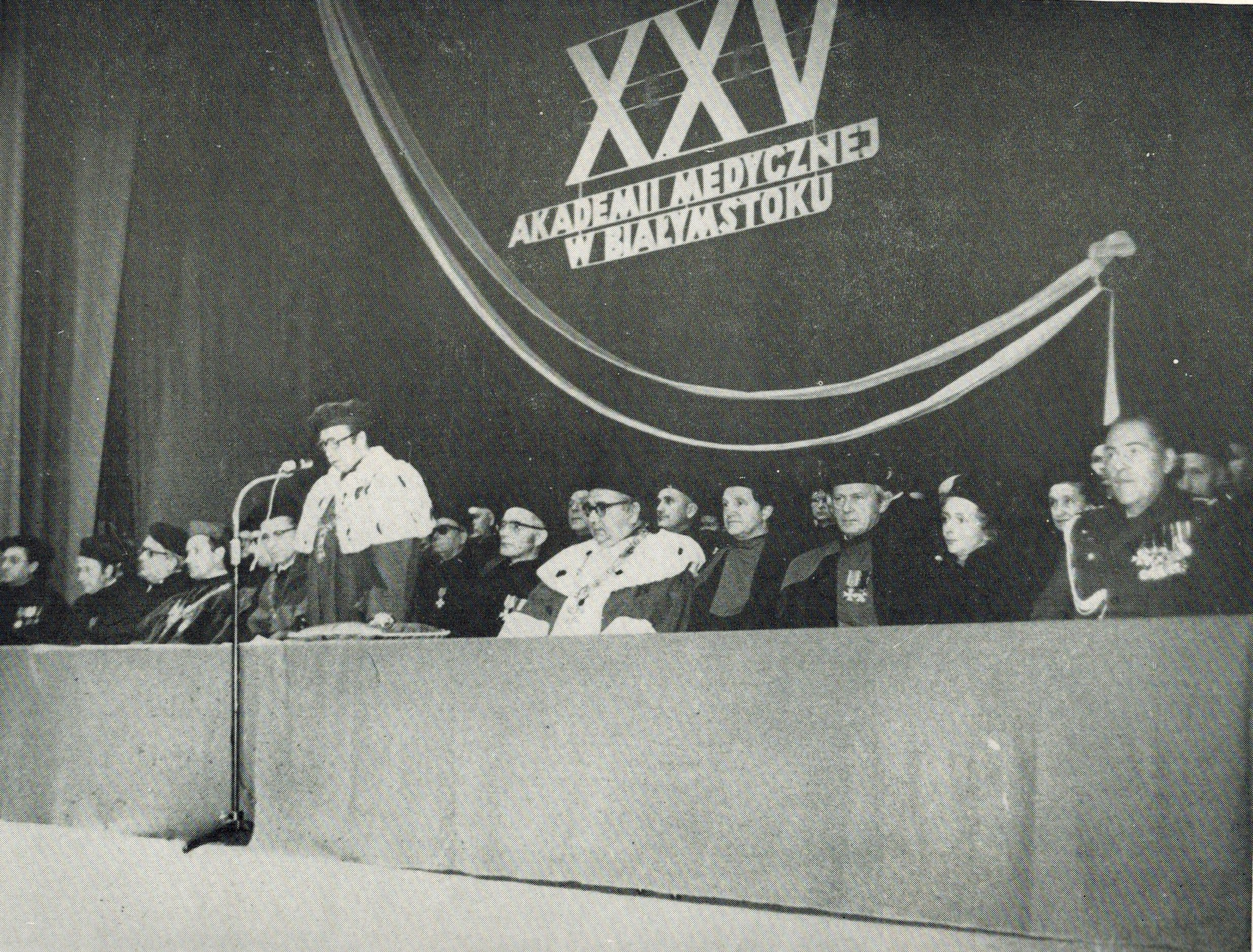 1975 25-lecie AMB, przemawia Konstanty Wiśniewski.